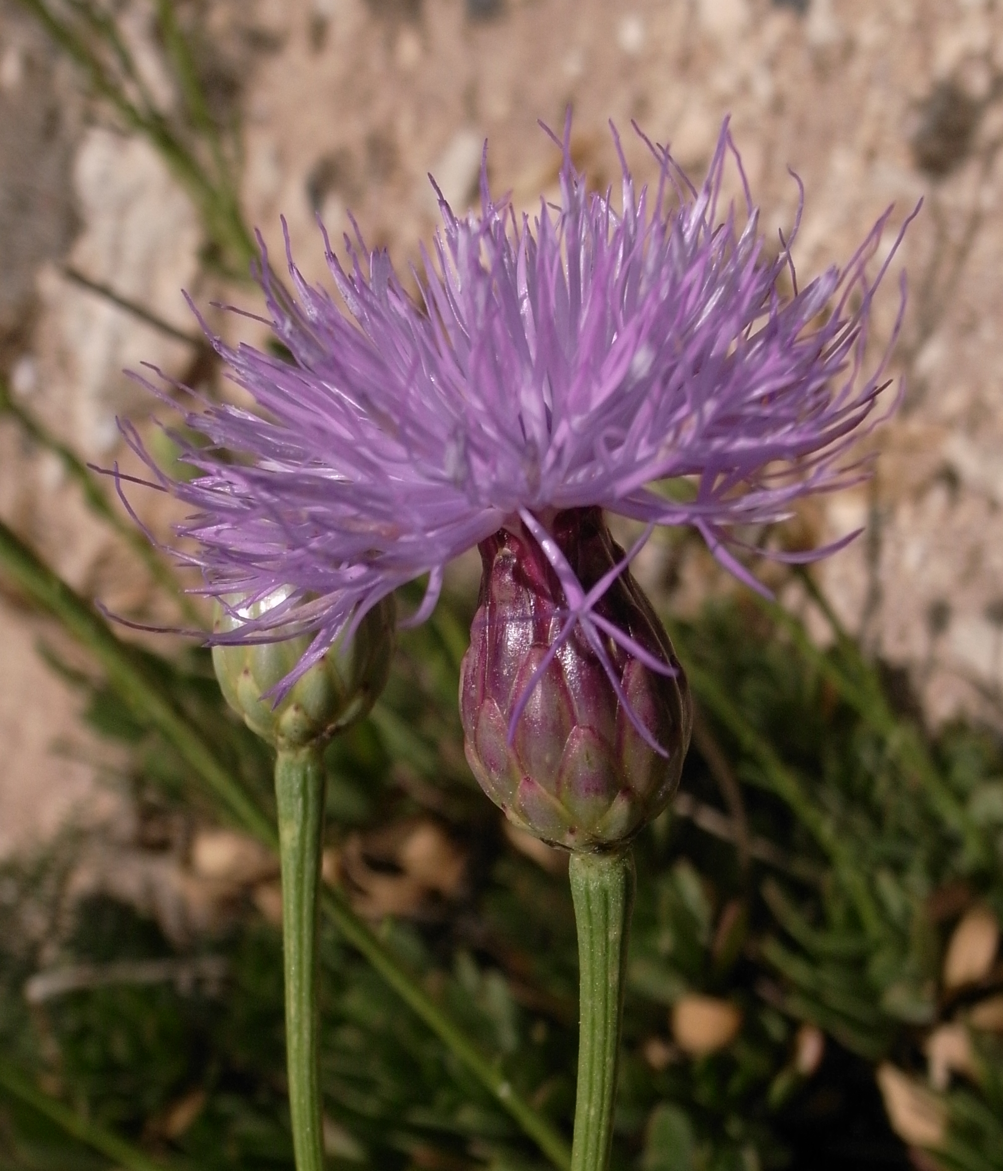 Cheirolophus crassifolius, Dingli Cliffs, Malta